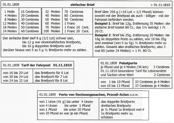 Tarif vom 01.01.1809 im Königreich Westphalen